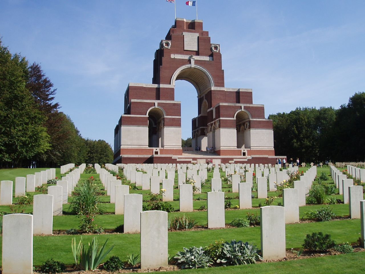 Thiepval (Somme, France) Le Mémorial et le cimetière.